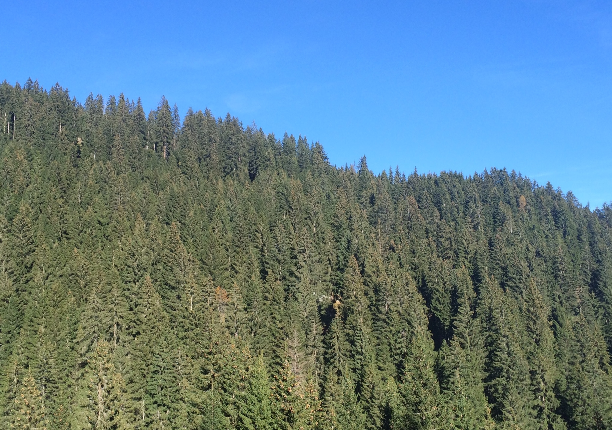 Tannenwald in der unteren Surselva